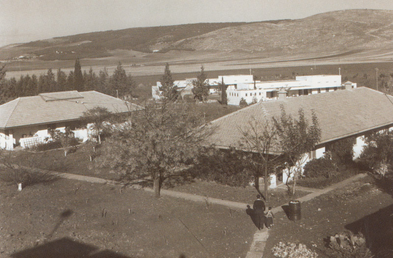 קיבוץ מזרע 1946 ארכיון ההגנה